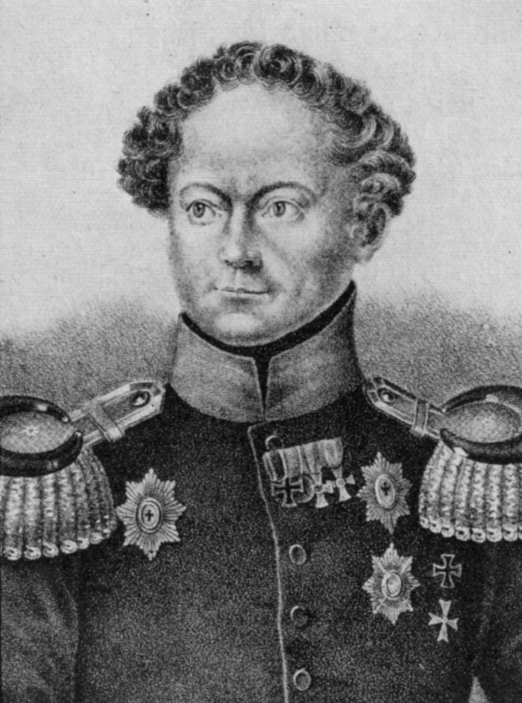 Leopold Anton Oldwig von Natzmer (1782–1861)